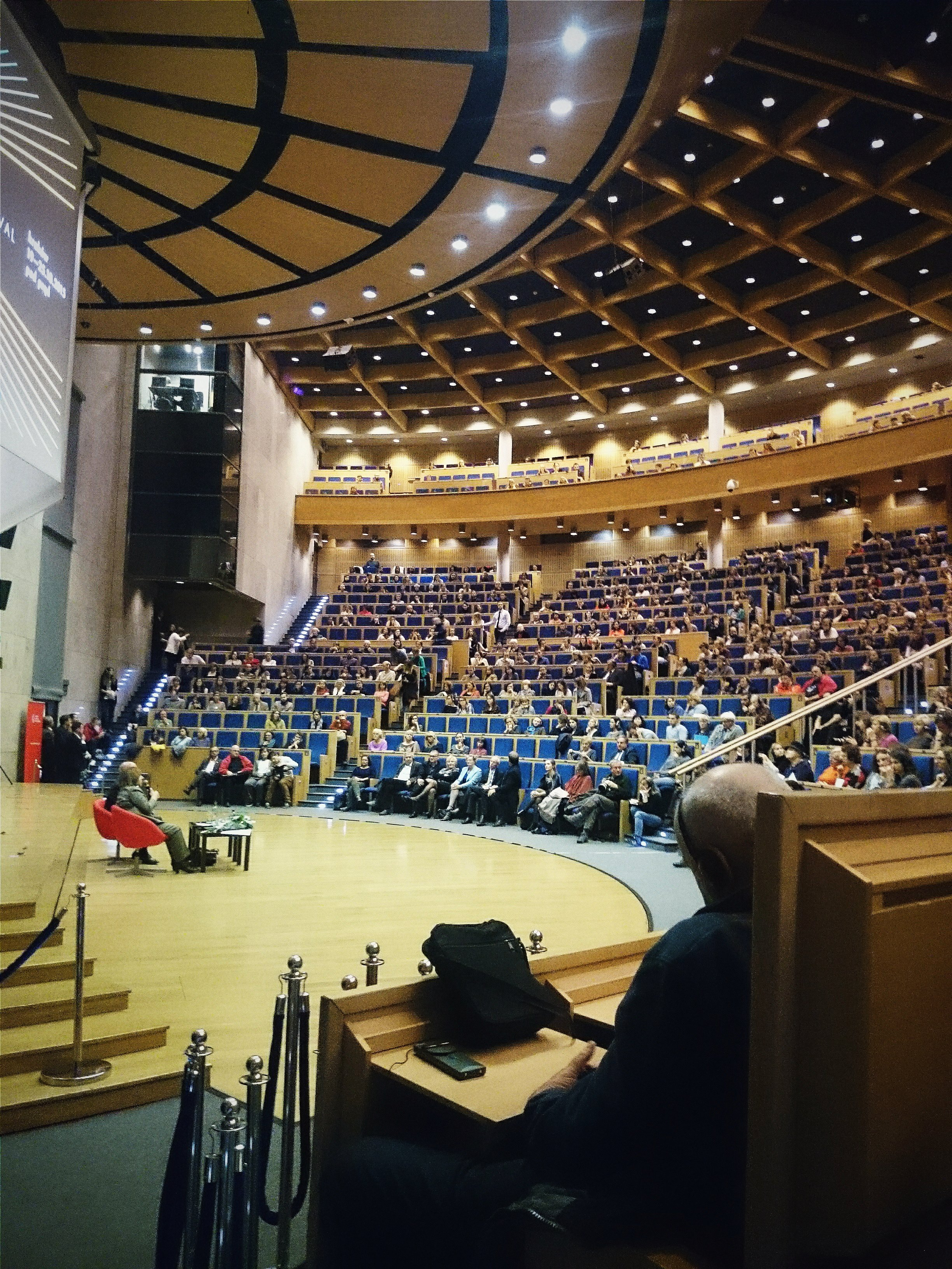 Svetlana Alexievich @ Conrad Festival 2015